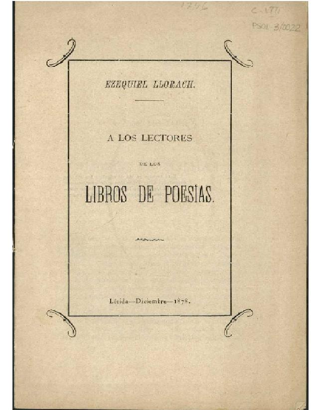 Llibres de Poemes. Ezequiel Llorach.